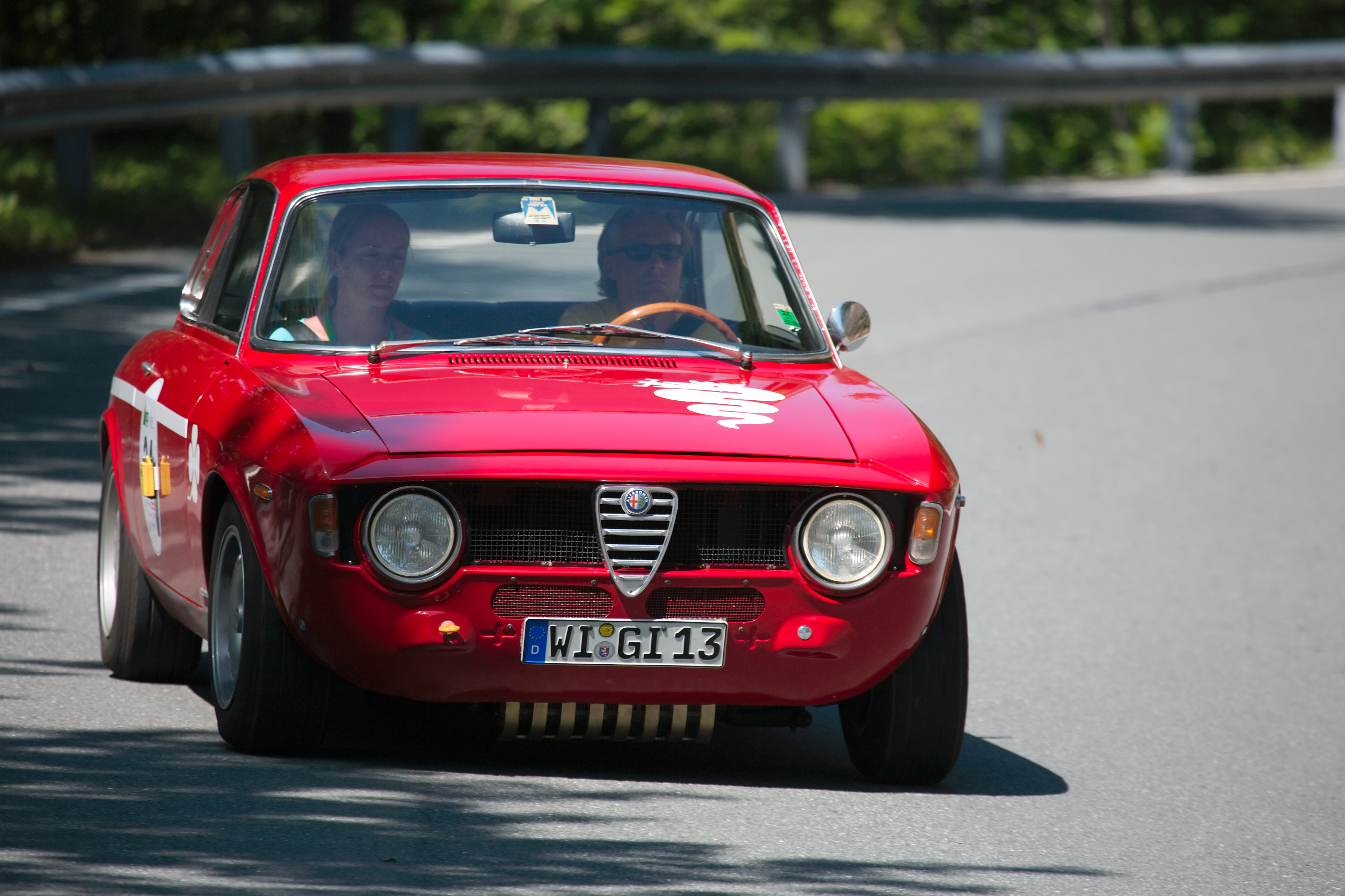 Alfa Romeo Giulia GTA "Scalino" del 1966